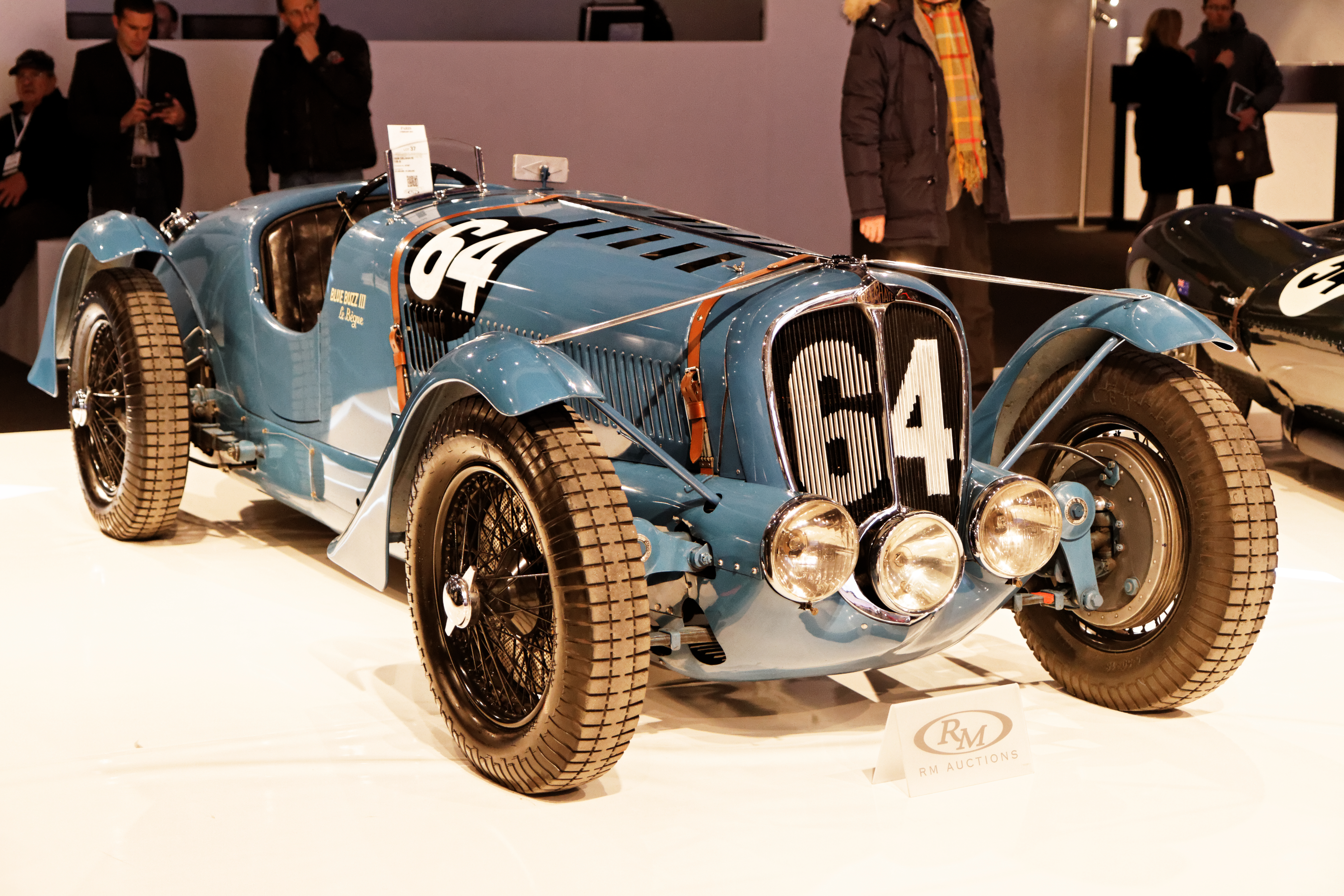 Une Delahaye 135 S de 1936.